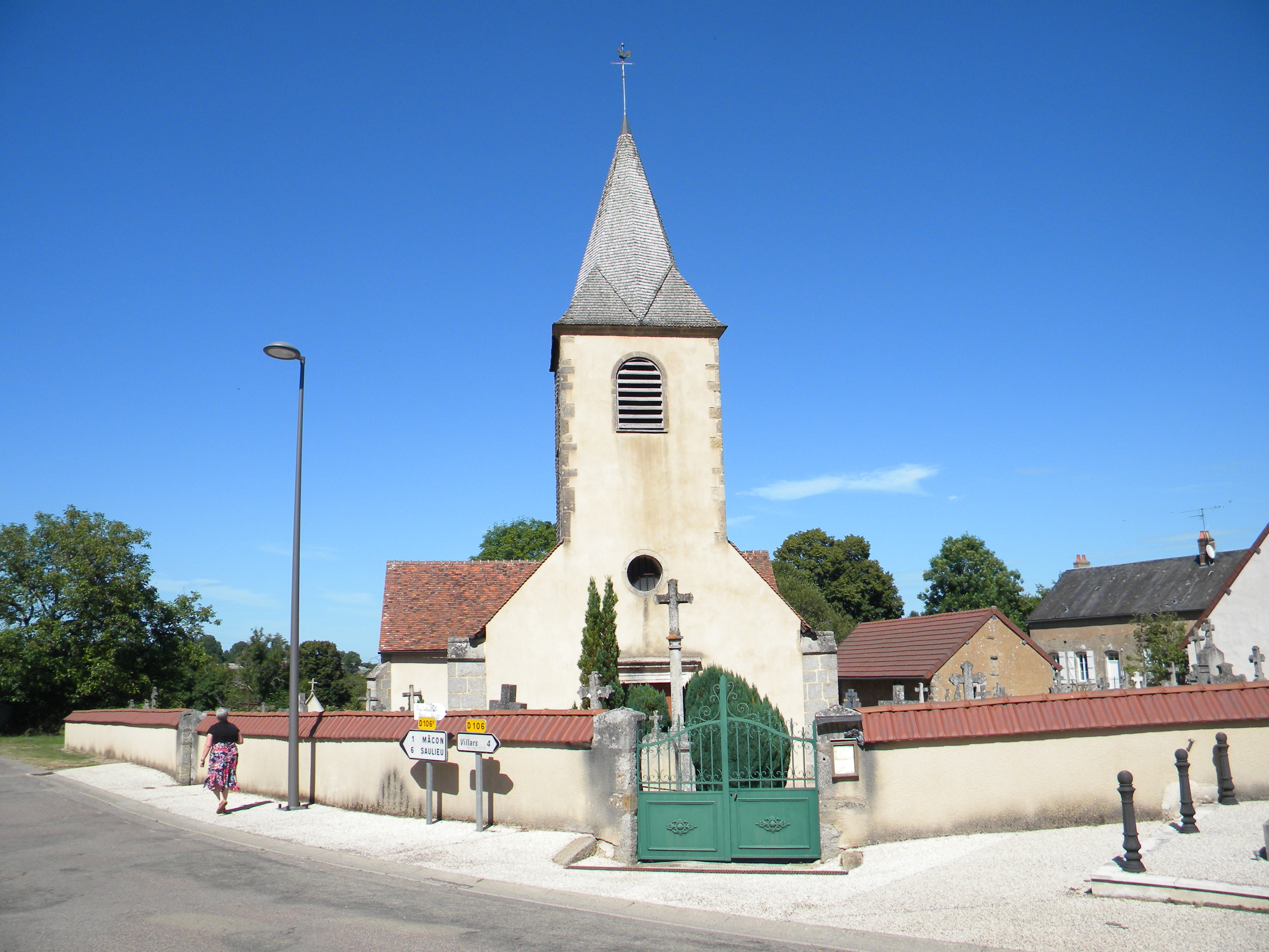 Kirko de Saint-Martin-de-la-Mer